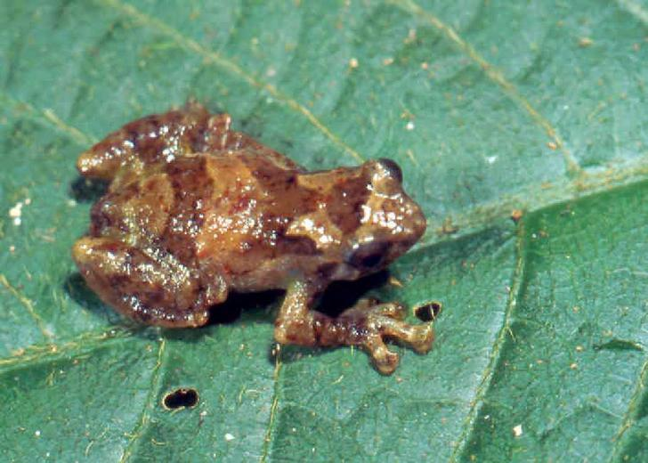 Cophyla occultansAnjanaharibe Rainforest (Madagascar)